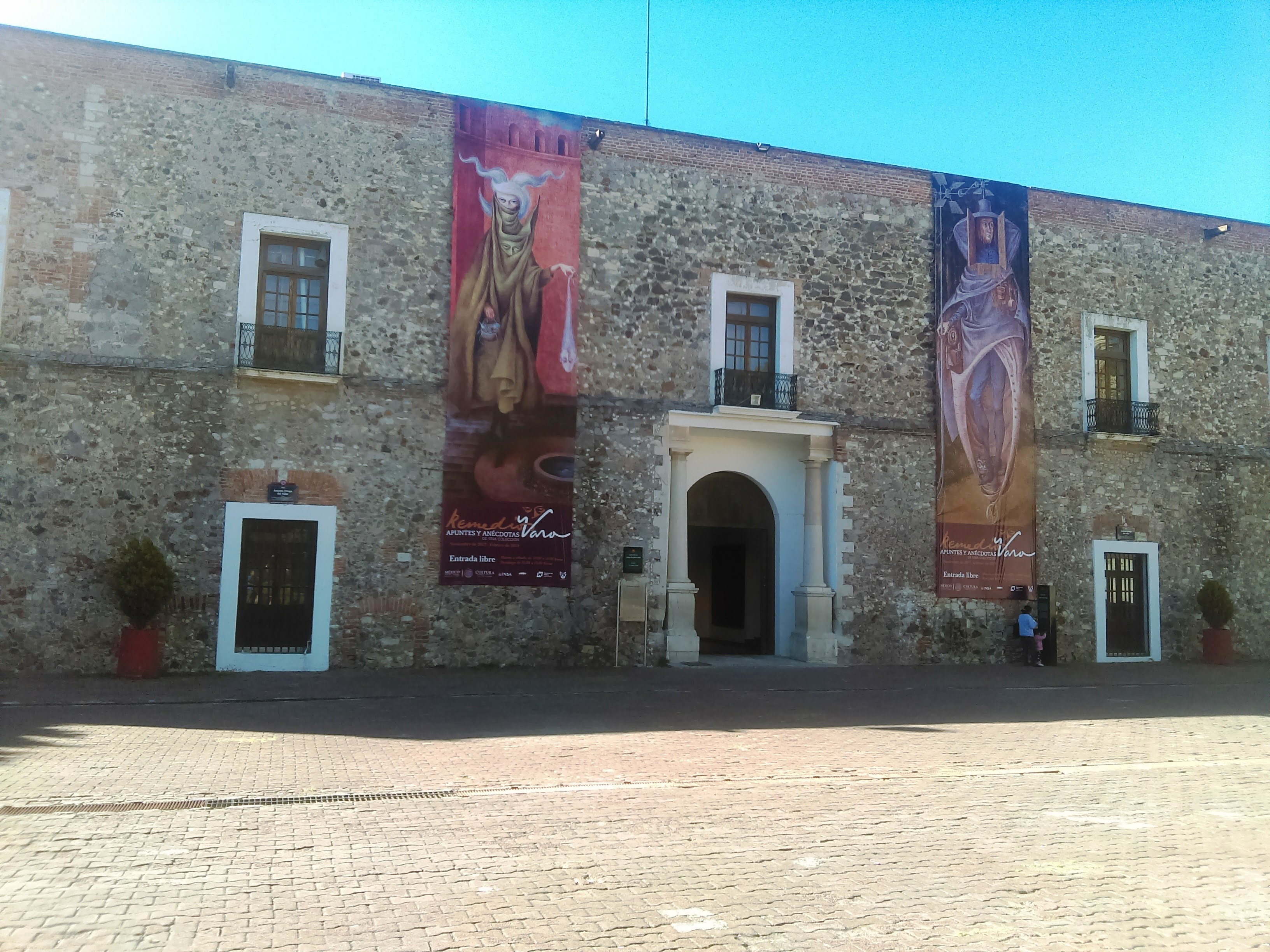 Cuartel del Arte en Pachuca, Hidalgo